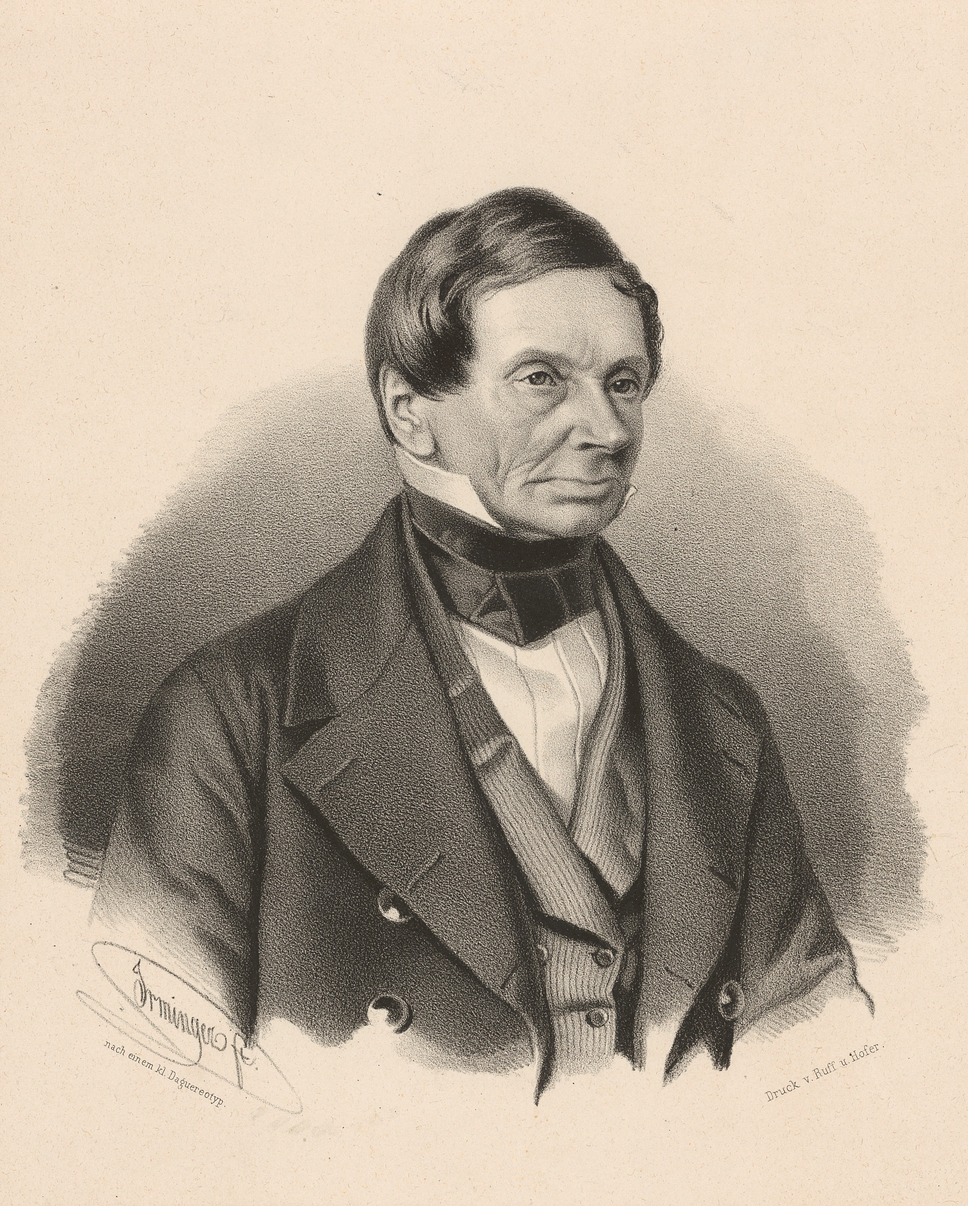 Lithografie von Johann Jakob Wirz (1778-1858)